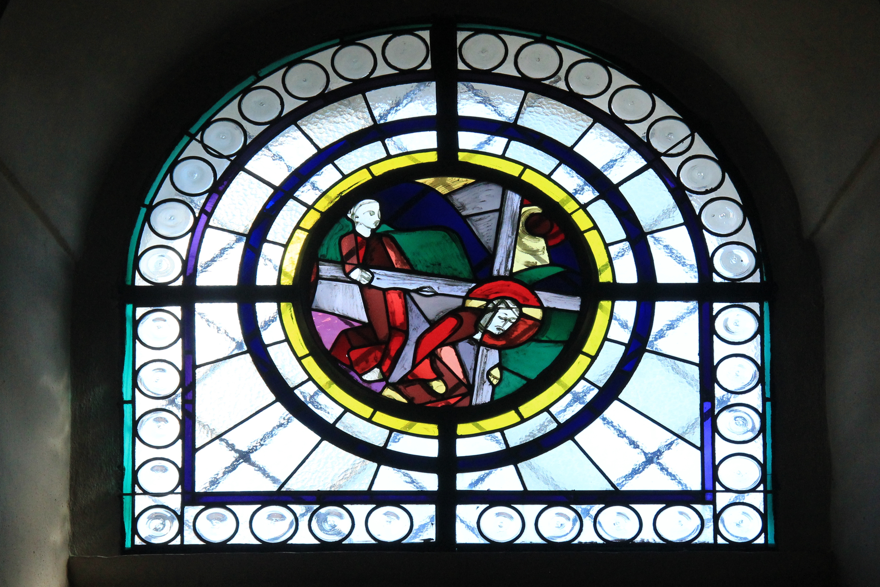 Kirche in St. Aegyd am Neuwalde, Niederösterreich - Glasfenster Simon von Zyrene hilft Jesus das Kreuz tragen (Robert Herfert, 1959/60)